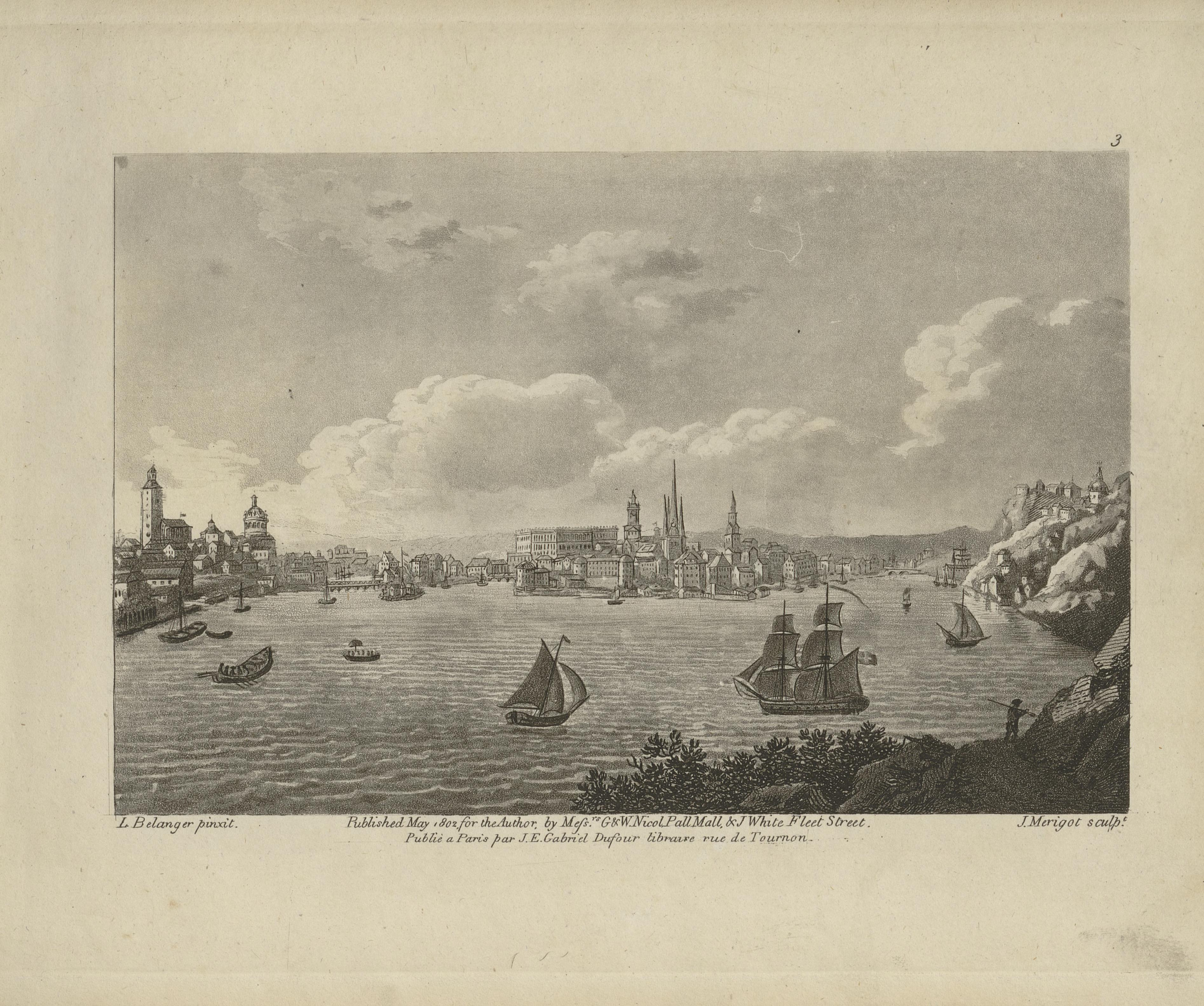 Vue de la Ville de Stockholm, située sur le Lac Mæler, prise de l'Ile de Langholm. Le bâtiment quarré qu'on aperçoit au milieu est le palais du Roi.